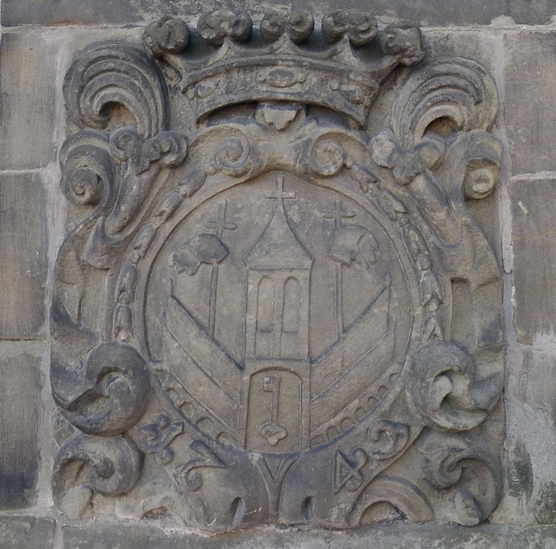 Brilon Am Markt1 Wappen im Bildstock an der Rathausfassade